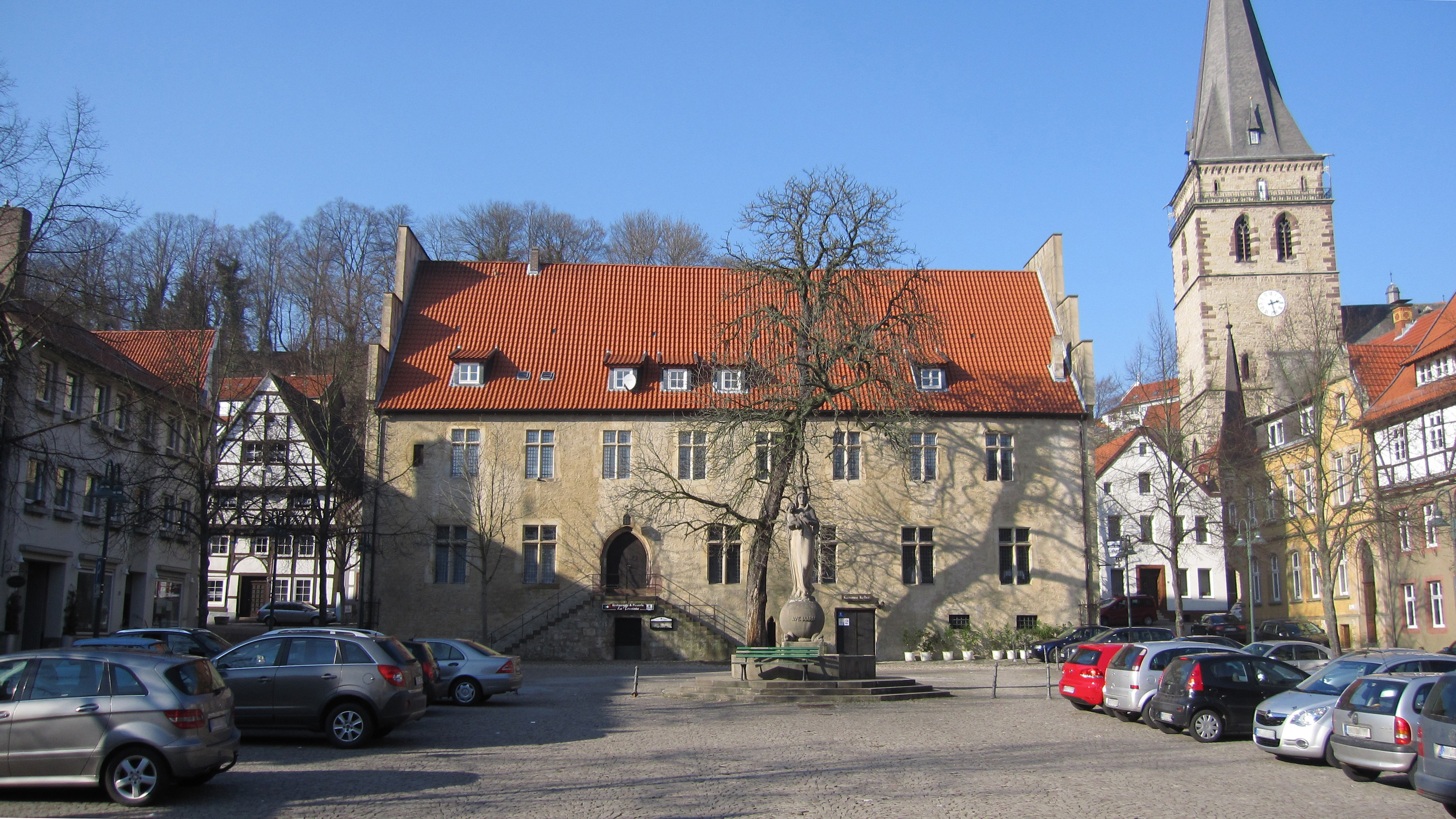 Der Warburger Altstadtmarktplatz mit dem ehemaligen Altstädter Rathaus, 1337 errichtet. Rechts die katholische Altstadtkirche St. Mariä Heimsuchung.